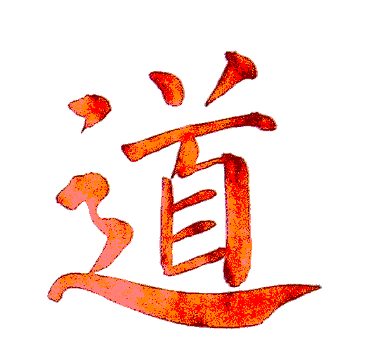 Ideograma Dao (tao), a partir da imagem disponí­vel no commons, em " selecionei e alterei o ideograma num programa de edição de imagens até obter este resultado.